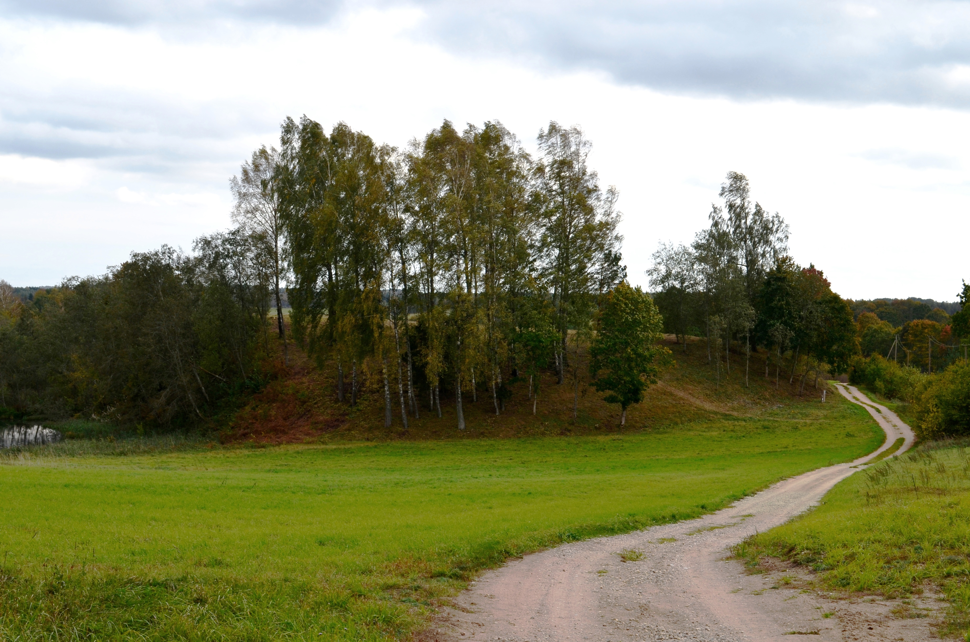 Sėbų piliakalnis, Telšių raj.